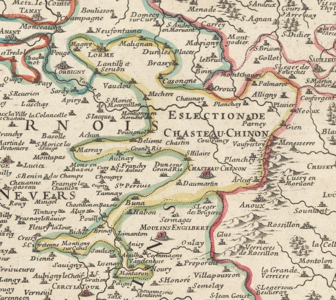 Election (circonscription d'Ancien Régime) de Château-Chinon, dans la généralité de Moulins.